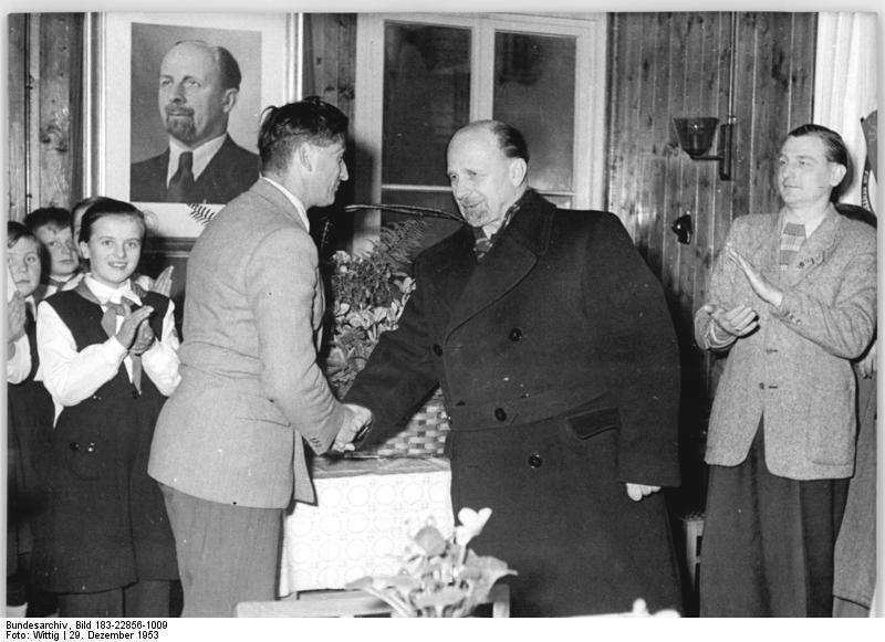 LPG Merxleben, Besuch durch Walter Ulbricht ADN-ZB Wittig (TBD) Me-Schm 29.12.1953 Walter Ulbricht besuchte LPG in Merxleben. Am 28.12.1953 besuchte der amtierende Ministerpräsident Walter Ulbricht die Landwirtschaftliche Produnktionsgenossenschaft in Merxleben, Kreis Langensalza, die seinen Namen trägt. Walter Ulbricht überzeugte sich von den bisherigen Erfolgen der Genossenschaftsbauern und beriet mit ihnen, wie sie zu noch größeren Erfolgen kommen können. UBz: Der Vorsitzende der Produktionsgenossenschaft Held der Arbeit Ernst Großmann begrüsst den amtierenden Ministerpräsidenten Walter Ulbricht.